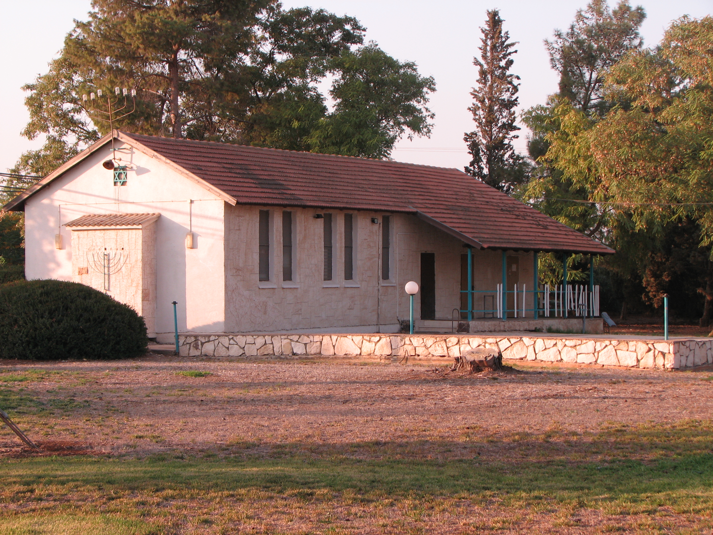 בית הכנסת במושב ברק